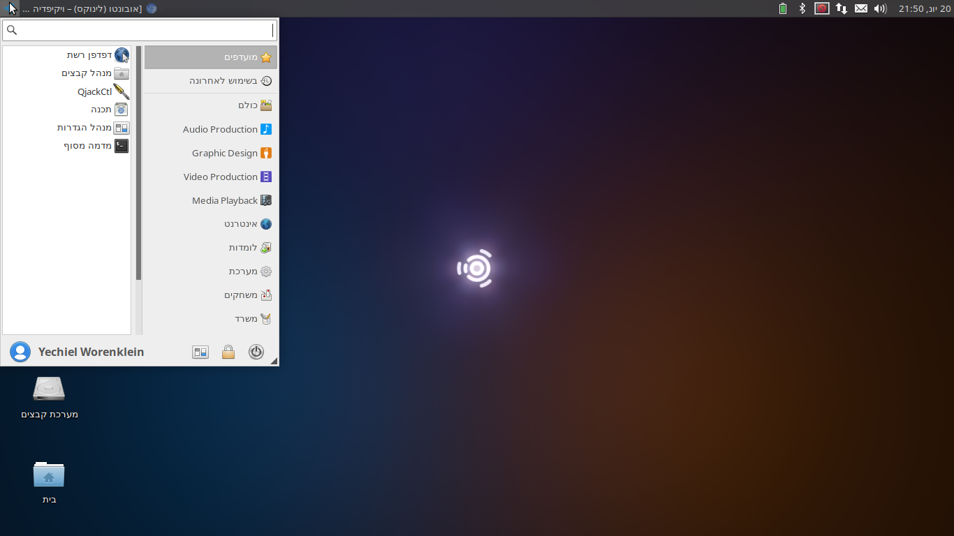 צילום מסך